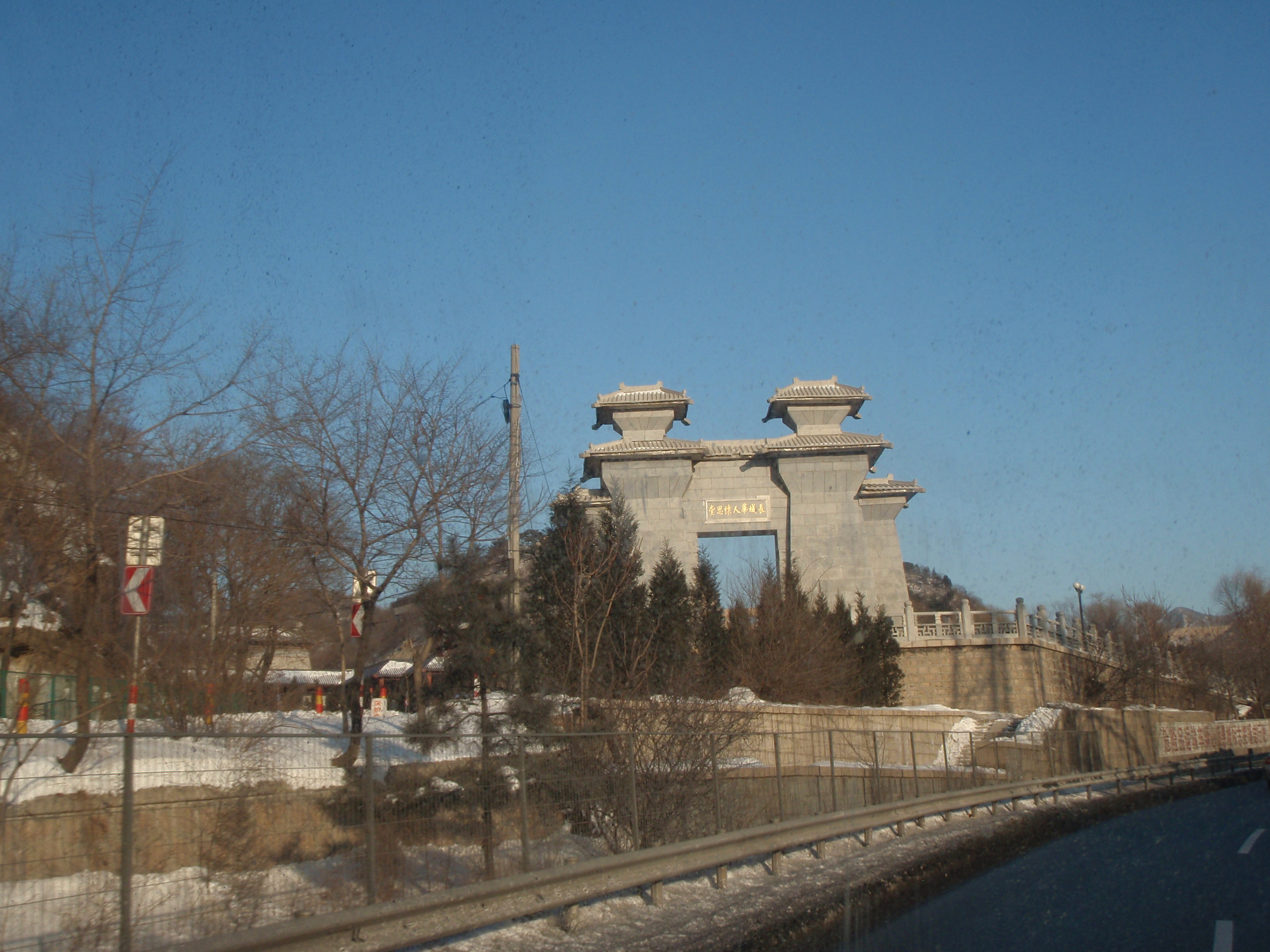 八达岭居庸关华人怀思堂